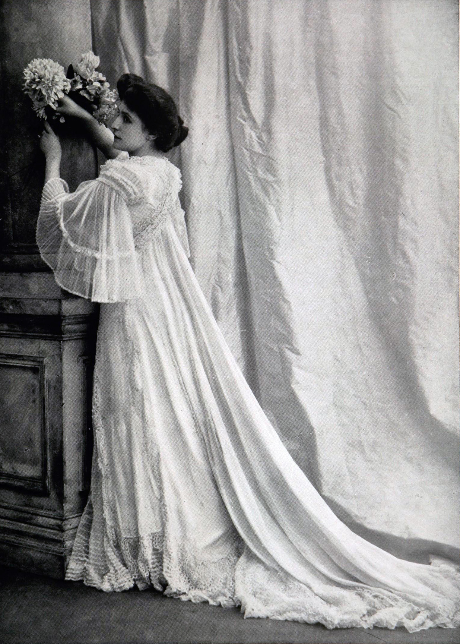 "Robe en crêpe de chine avec incrustation d'angleterre ; devant en tulle plissé ; ceinture liberty brodée de perles fines." Photograph in Les Modes : Revue mensuelle illustrée des arts décoratifs appliqués à la femme.